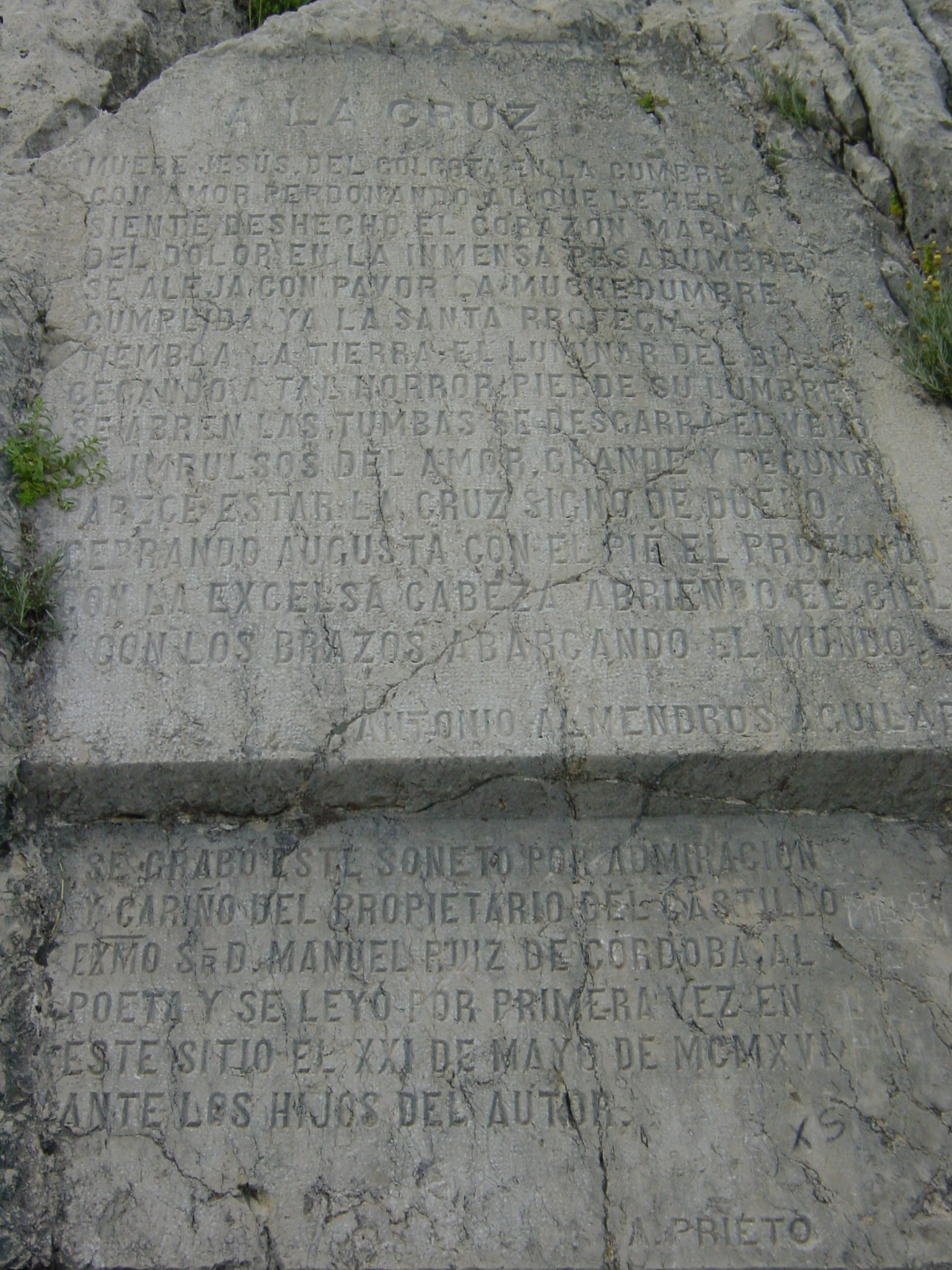 Soneto a la Cruz, de Antonio Almendros Aguilar, tallado por el cantero Antonio Prieto.